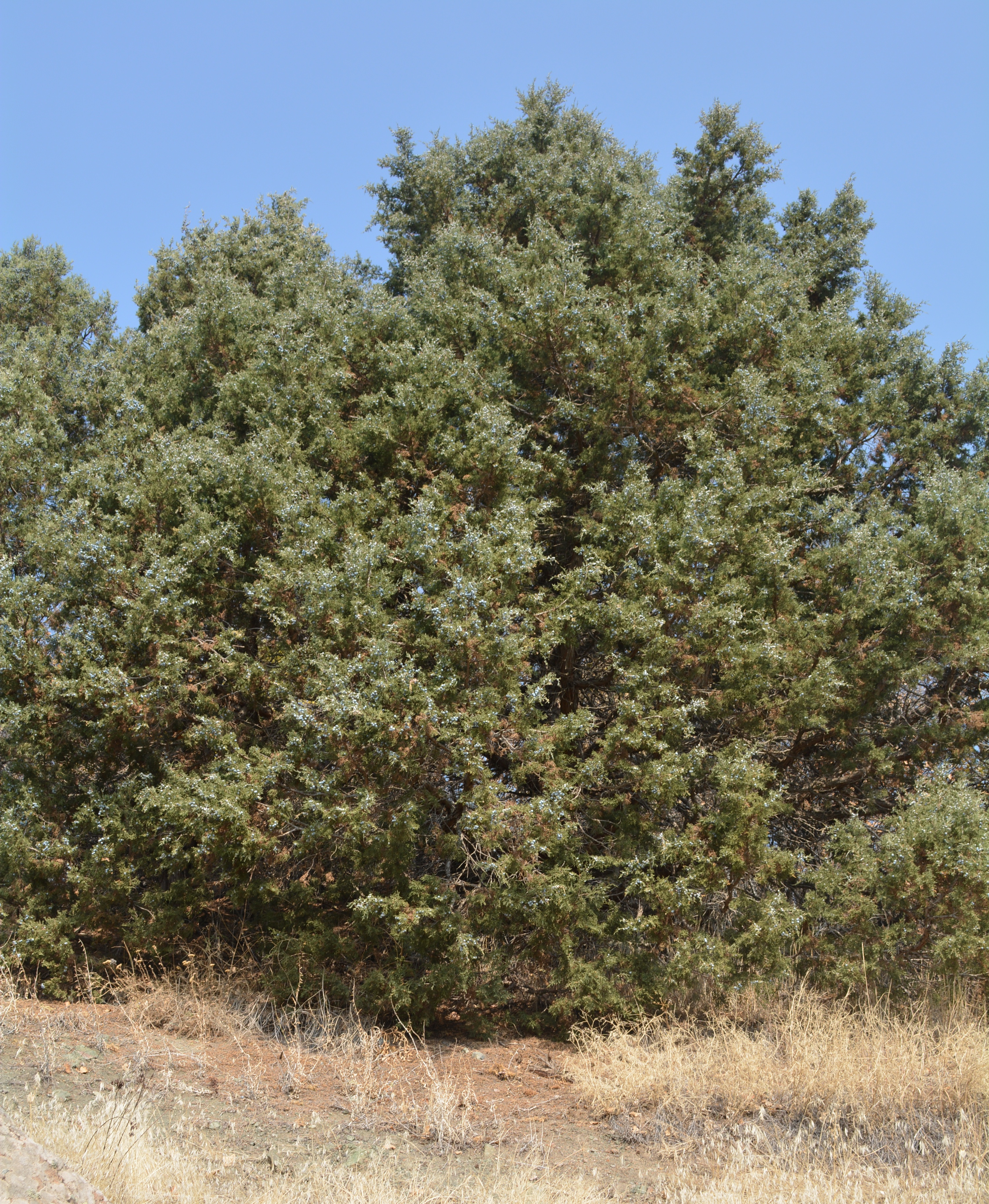 Խոսրով